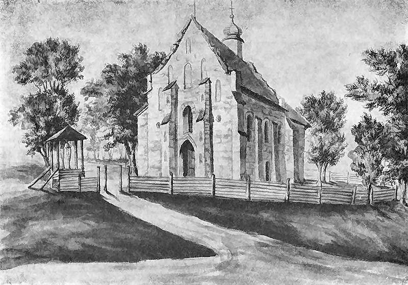 Kościół Trójcy Przenajświętszej w Iszkołdzi, widok fasady i elewacji bocznej kościoła z wyodrębnionym prezbiterium, z sygnaturką i uskokowymi skarpami. Dat.: 28 Sierp. 1876. Napis: Iszkold - Dawny Kościół Aryański; napis na podkładzie: Iszkoldz. G. Mińska (Nowodródzkie).